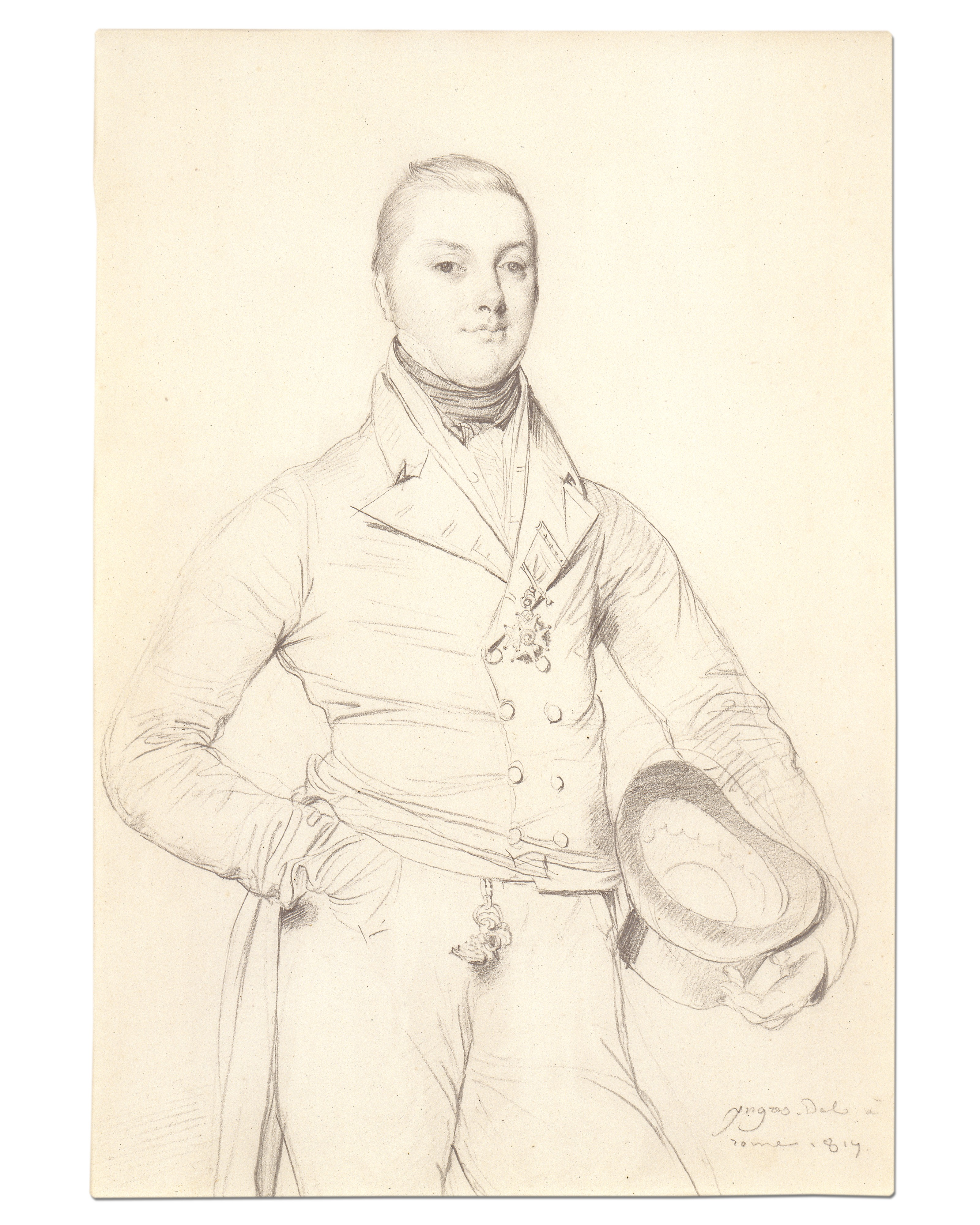 Drawing; Drawings